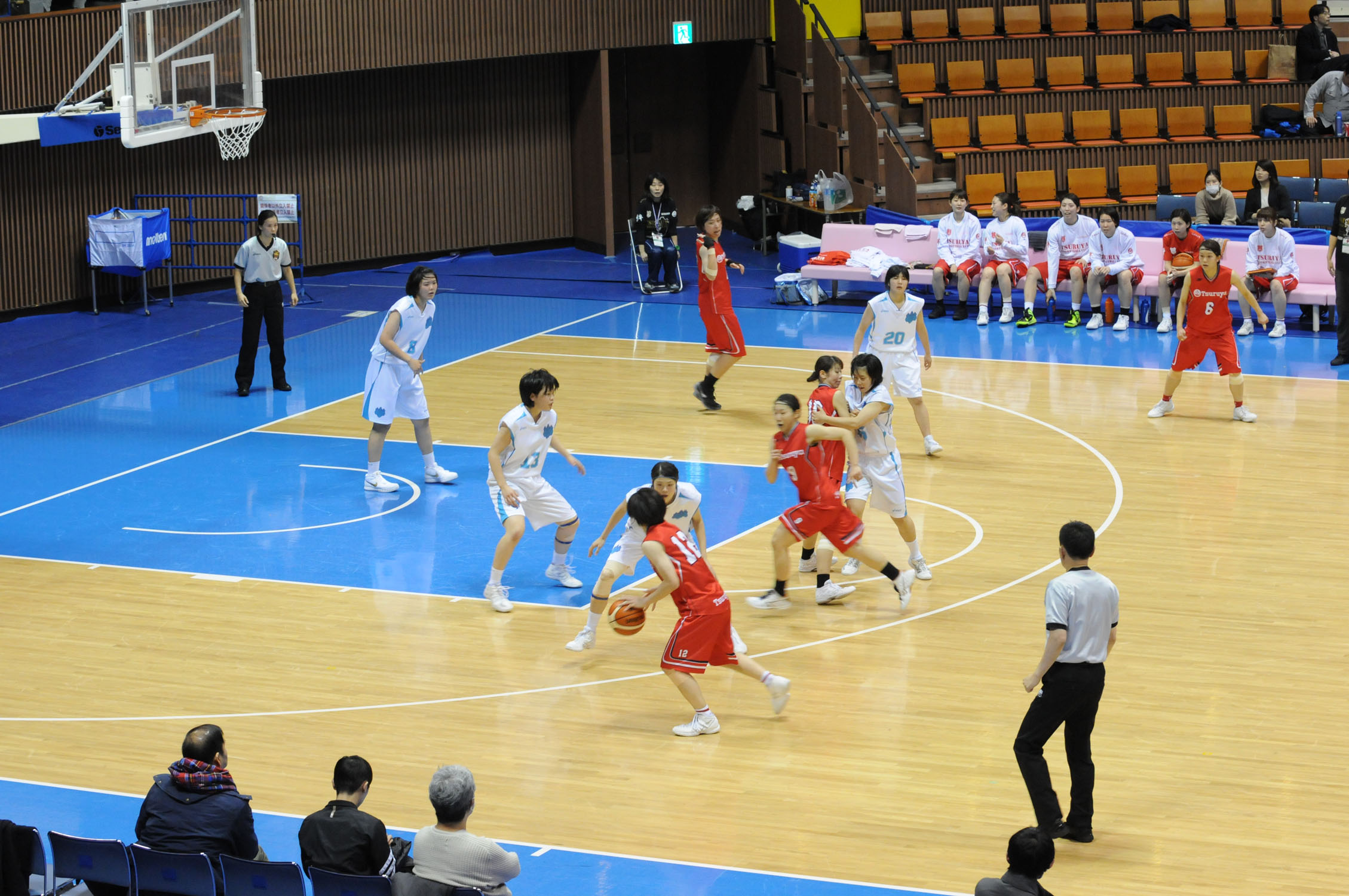 2016年全日本総合バスケットボール選手権大会二回戦、筑波大学対アカシヤクラブ。代々木第二体育館で。